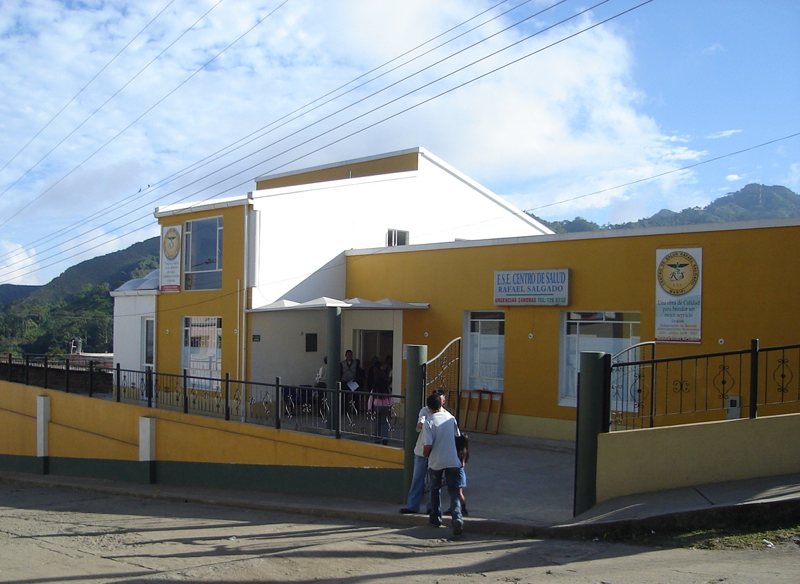 Fachada de la Empresa Social del Estado Centro de Salud «Rafael Salgado» del municipio de Maripí, Boyacá, Colombia